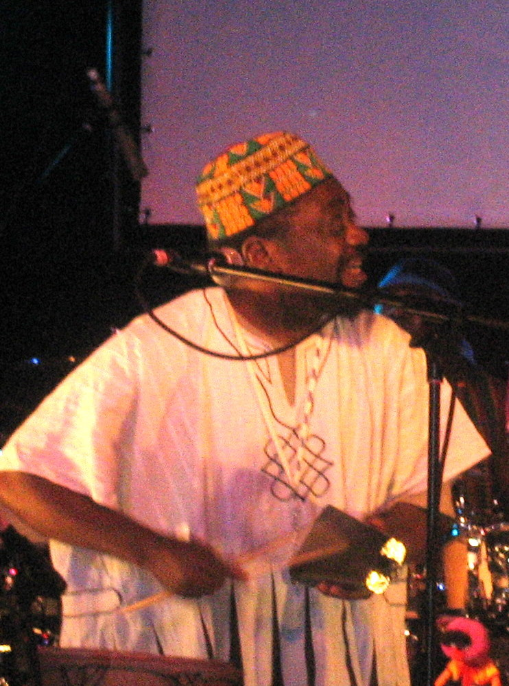 Osibisa, Wallingford Bunkfest 2008